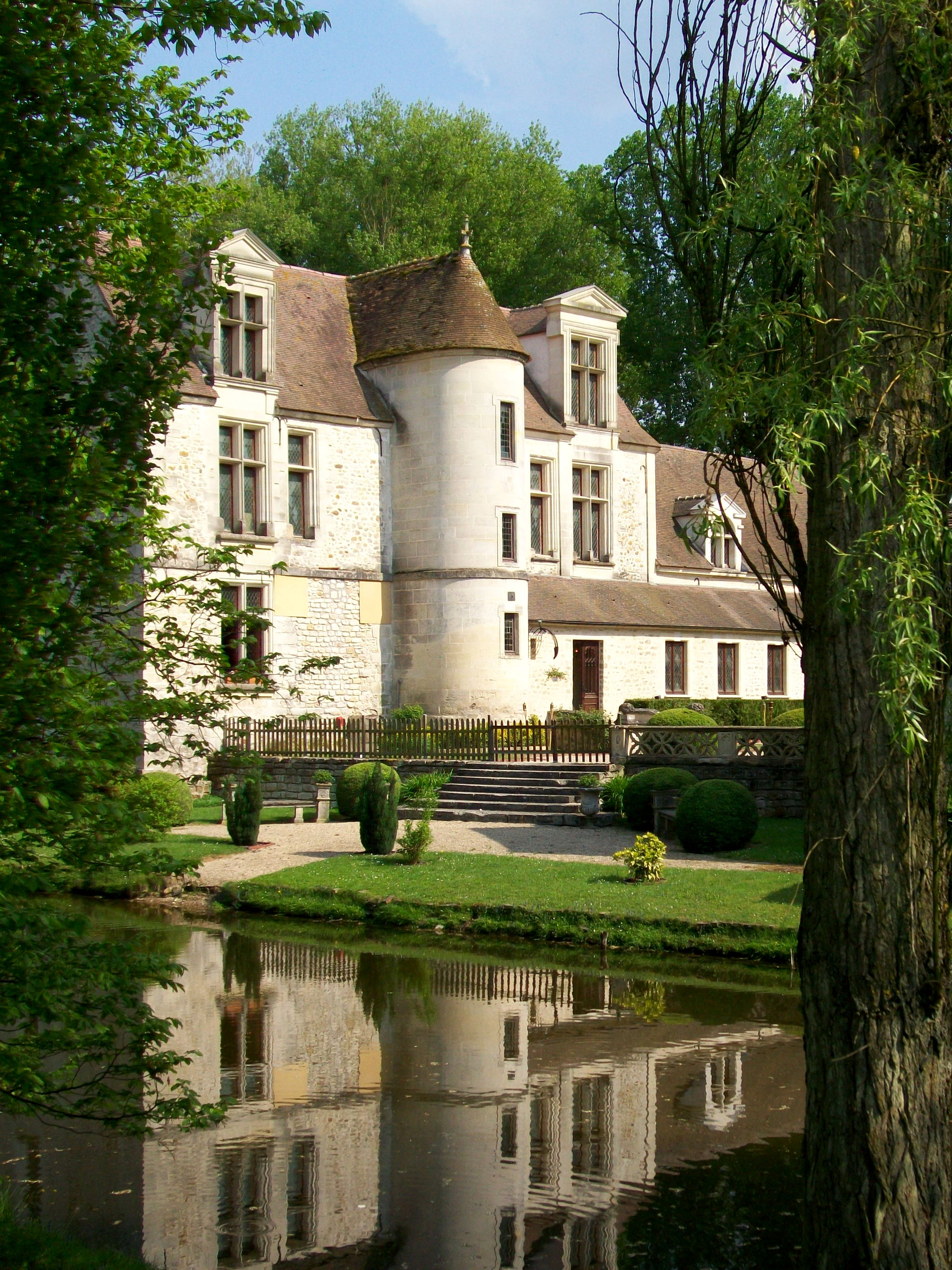 La façade principale du logis sur la cour, avec la tour d'escalier.